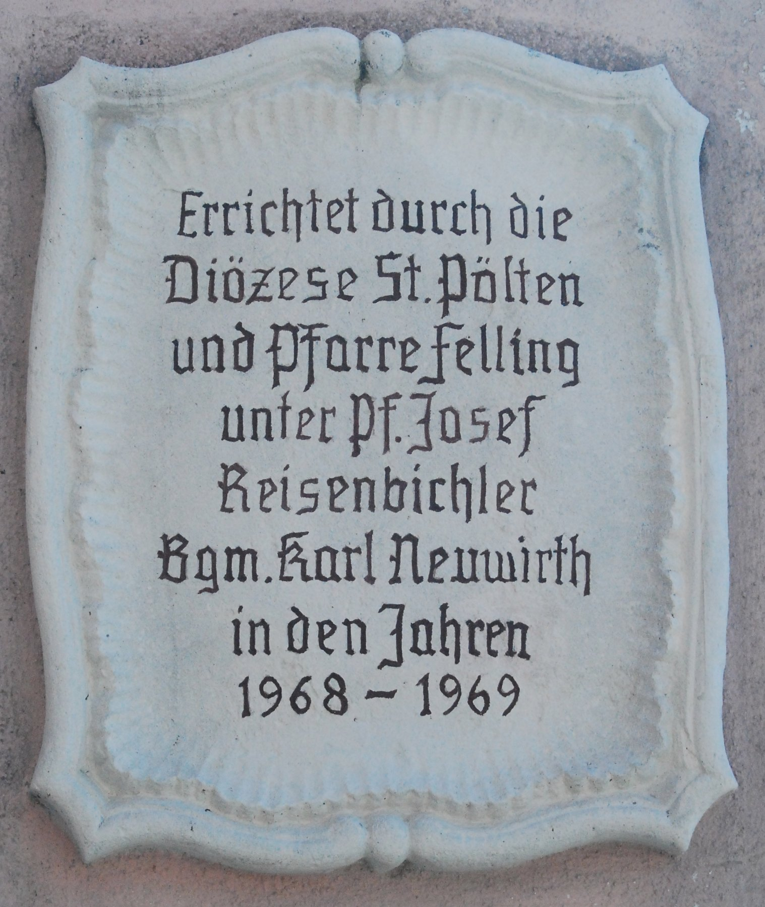 Tafel an der Pfarrkirche von Felling (Stadtgemeinde Hardegg) in Niederösterreich.